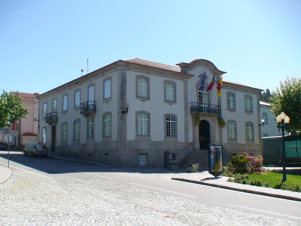 PaÃ§os do Concelho (Sede do municÃ­pio), Vouzela. Fachada.